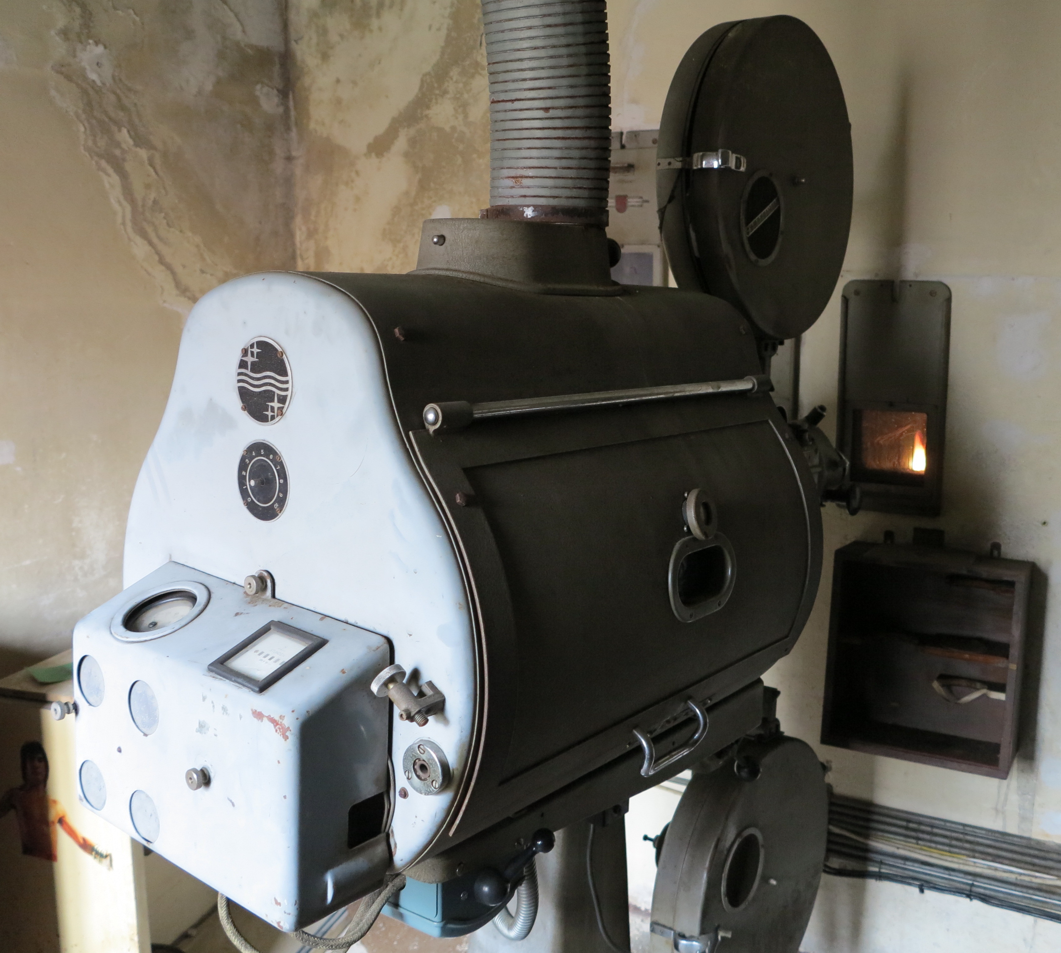 Einer von zwei Filmprojektoren des bis 1985 betriebenen Kinos Eden-Lichtspiele in Lübeck am Tag des Offenen Denkmals 2013